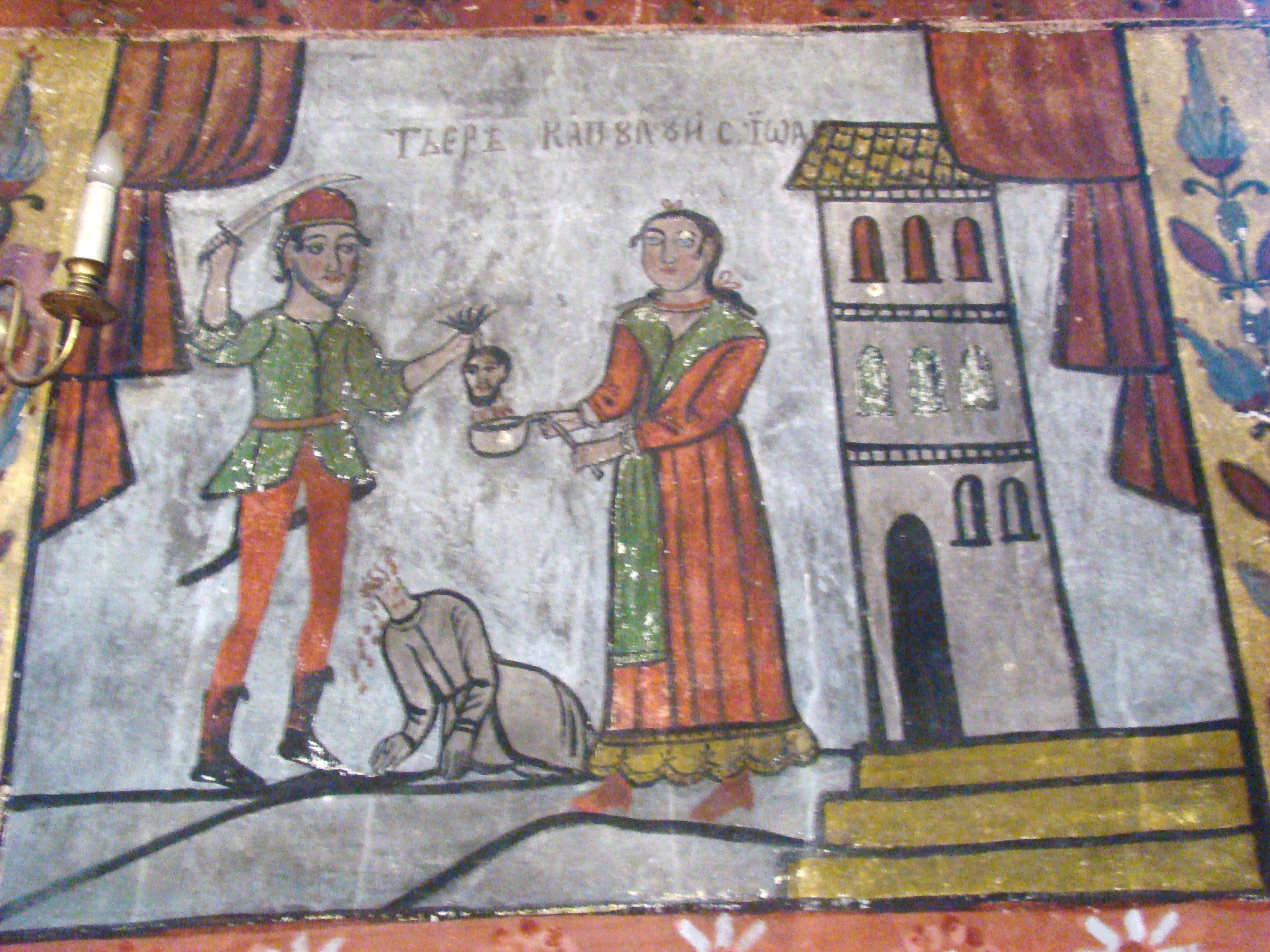 Biserica „Nașterea Maicii Domnului” din Homorog, județul Bihor